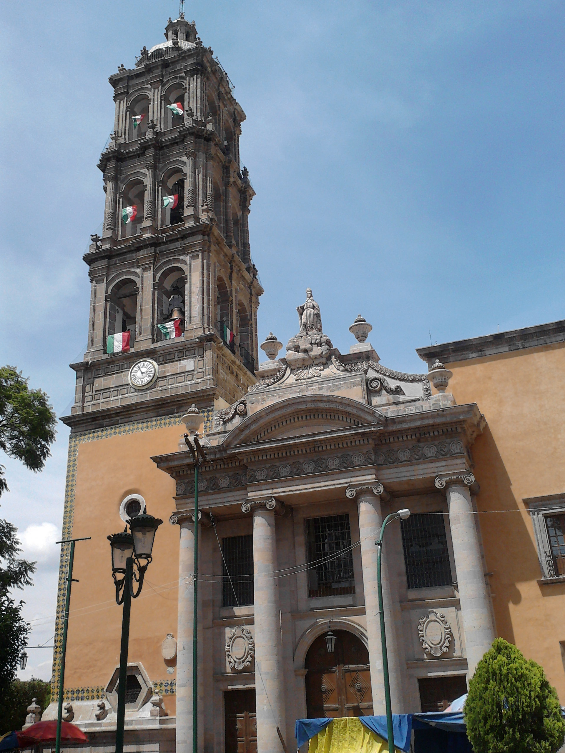 catedral mas importante en celaya es la de san francisco. elegante, y símbolo de la fe católica de los celayences.